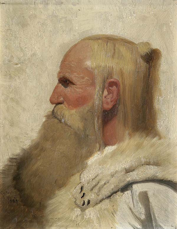 Germane mit Eisbärenfell. Öl auf Holz, signiert, datiert: 1893, rückseitig auf altem Klebezettel bezeichnet, 25 x 19.5 cm